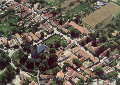 Dunabogdány, Hungary, aerialphotography